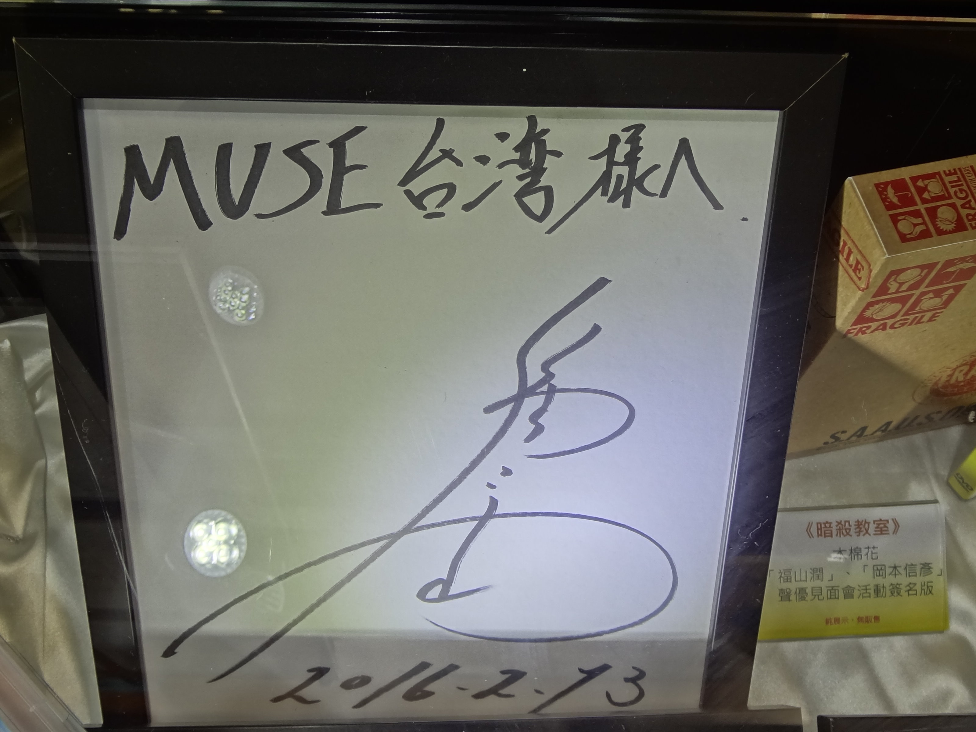 動漫爭艷嘉年華展區《暗殺教室》主題館，展示2016年2月13日台北國際動漫節《暗殺教室》電視動畫版聲優福山潤送給木棉花國際的簽名板。